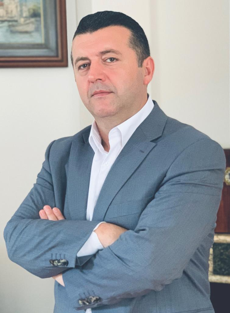 Srpski (latinica): Orhan nakon promocije knjige